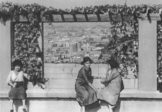 Нагорный парк культуры и отдыха им. С. М. Кирова. 1936 год